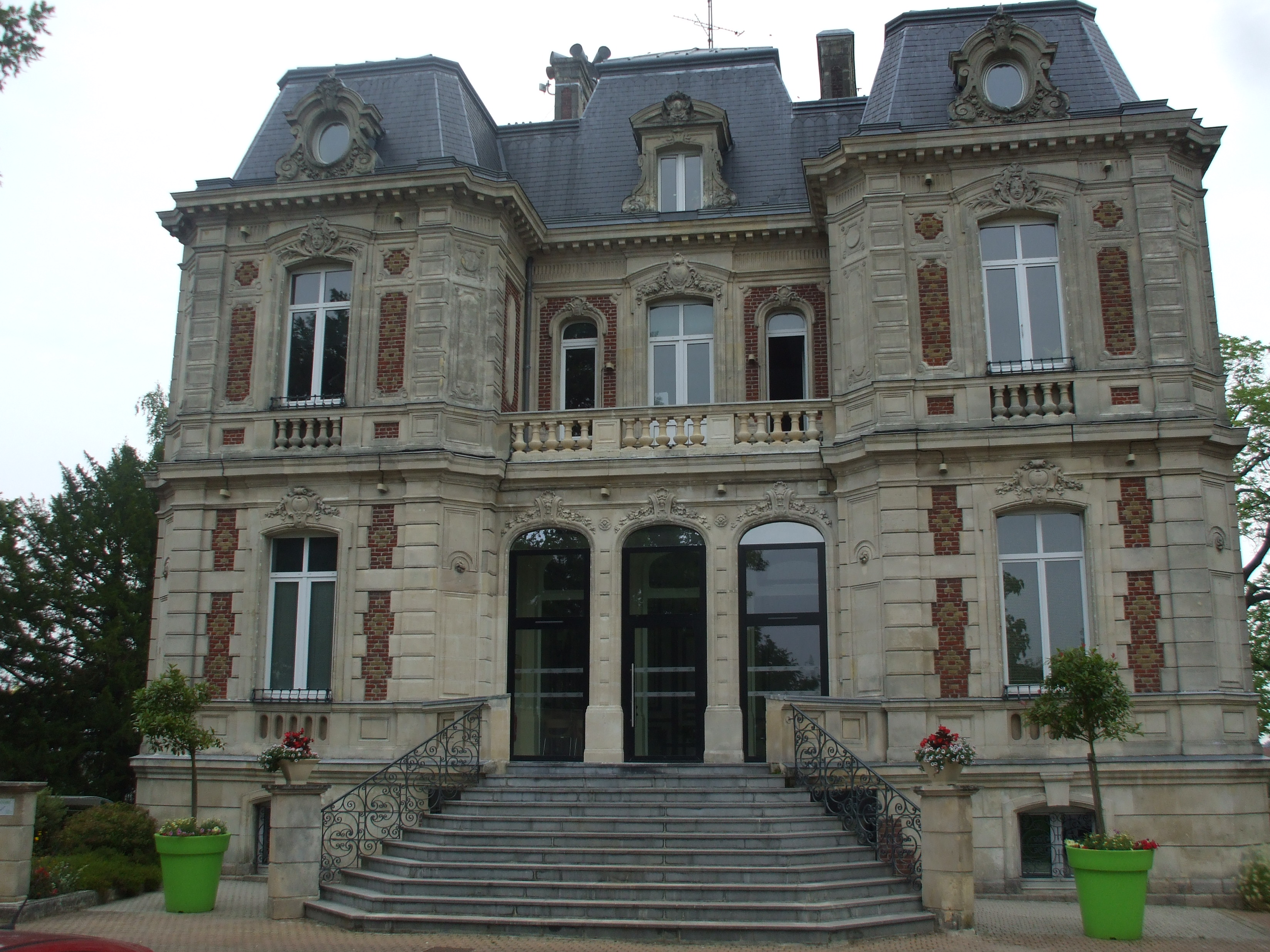 Beuvrages mairie Château Lefebvre-Carlier